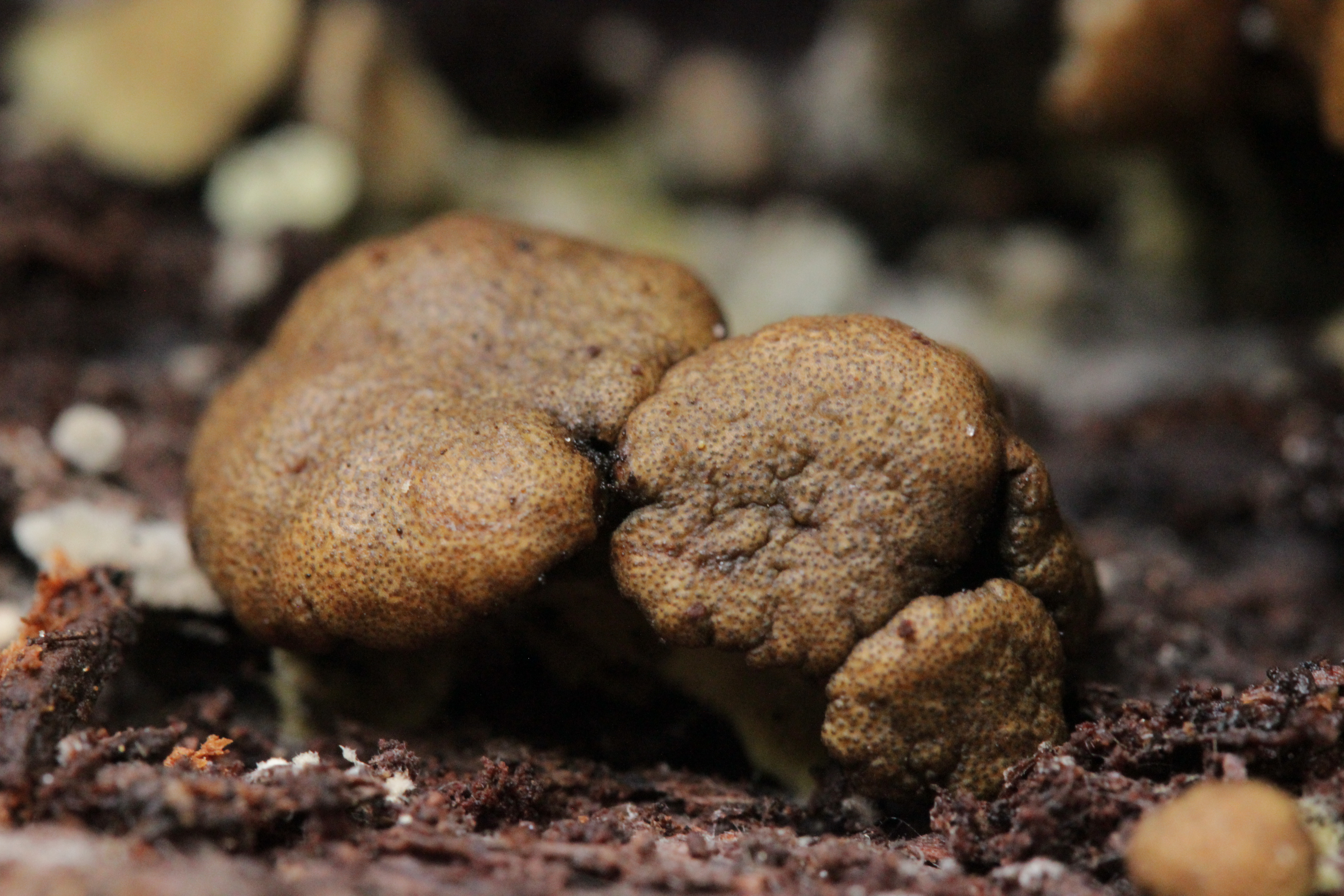 Hypocrea sp.